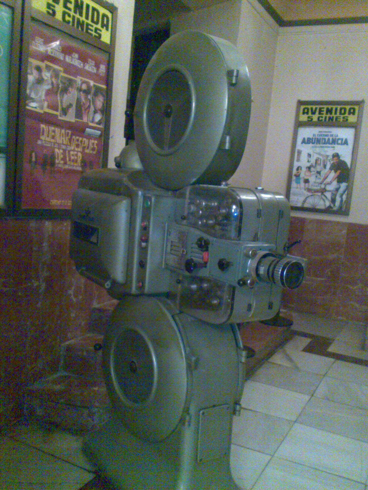 Proyector de películas FH-35/70 que ha estado ubicado en el cince Cervantes de Sevilla